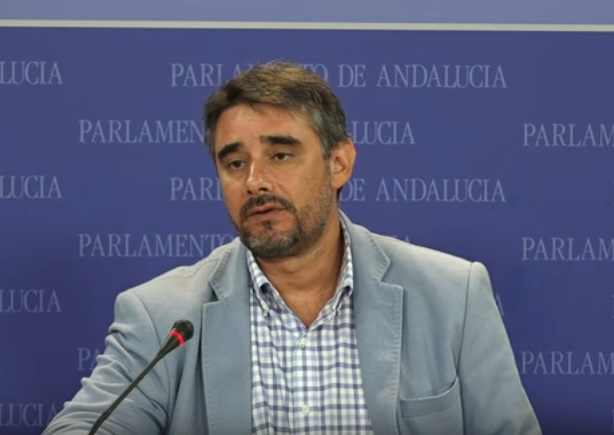 Rueda de prensa 20 de septiembre de 2016. Parlamento de Andalucía